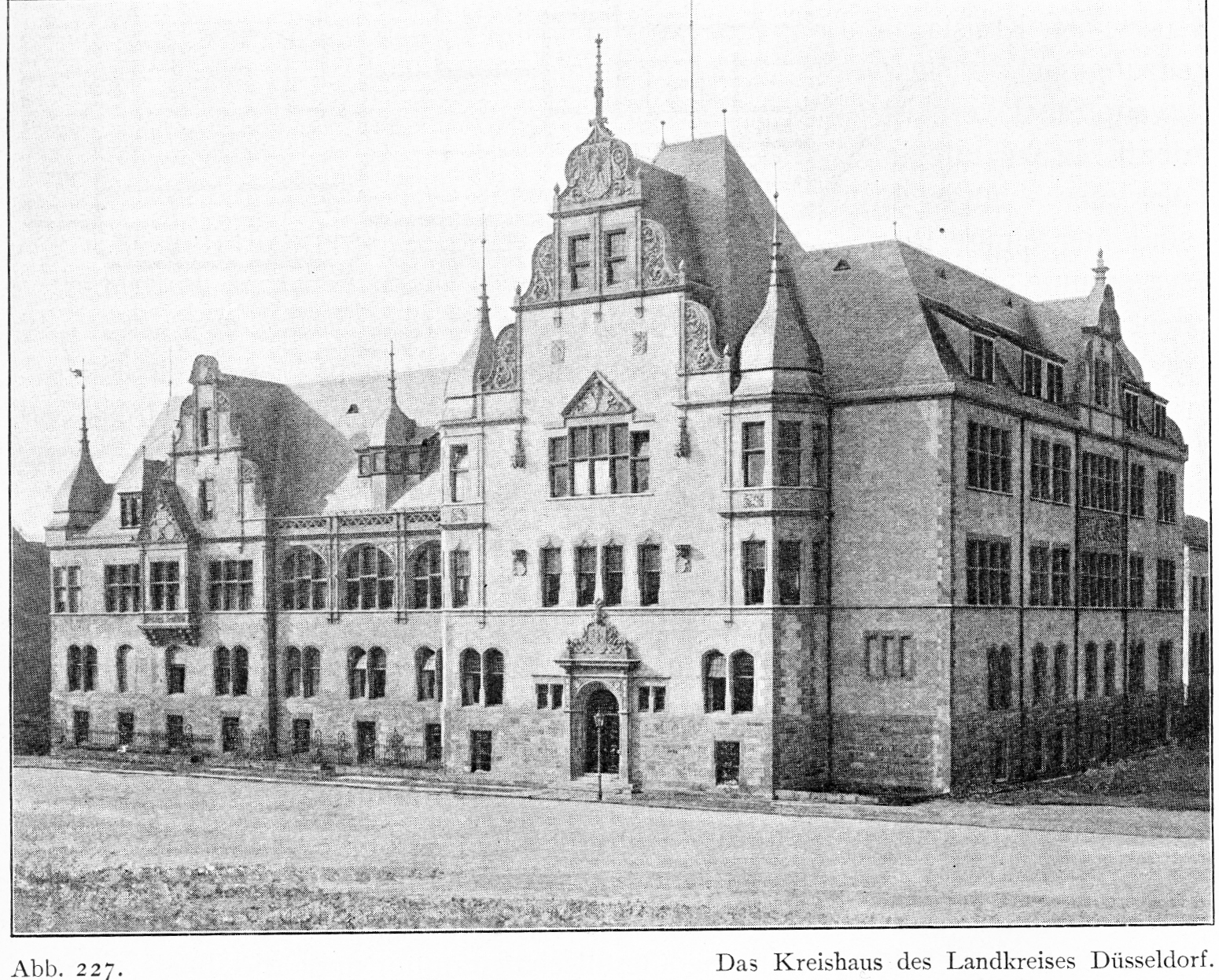 Kreishaus Düsseldorf an der Kasernenstraße, Ecke Bahnstraße in Düsseldorf, 1901 bis 1903 Architekt Fr. Aug. Küster